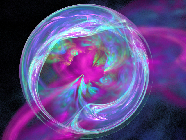 Fraktál Labda, egy alkotás részlete. Készítette: Szlávics Alexa